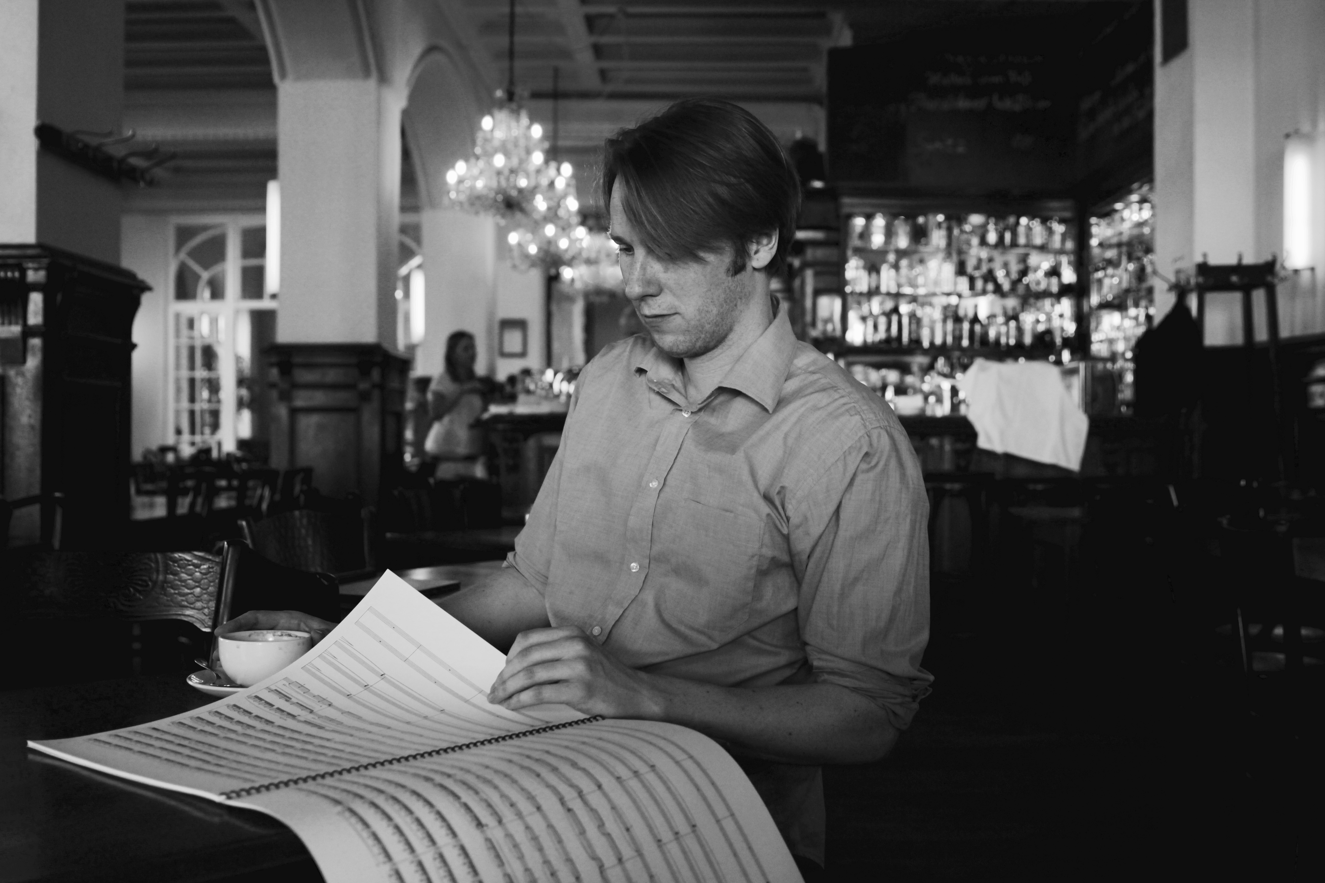 Der Komponist Henrik Ajax mit einer Partitur im Café.